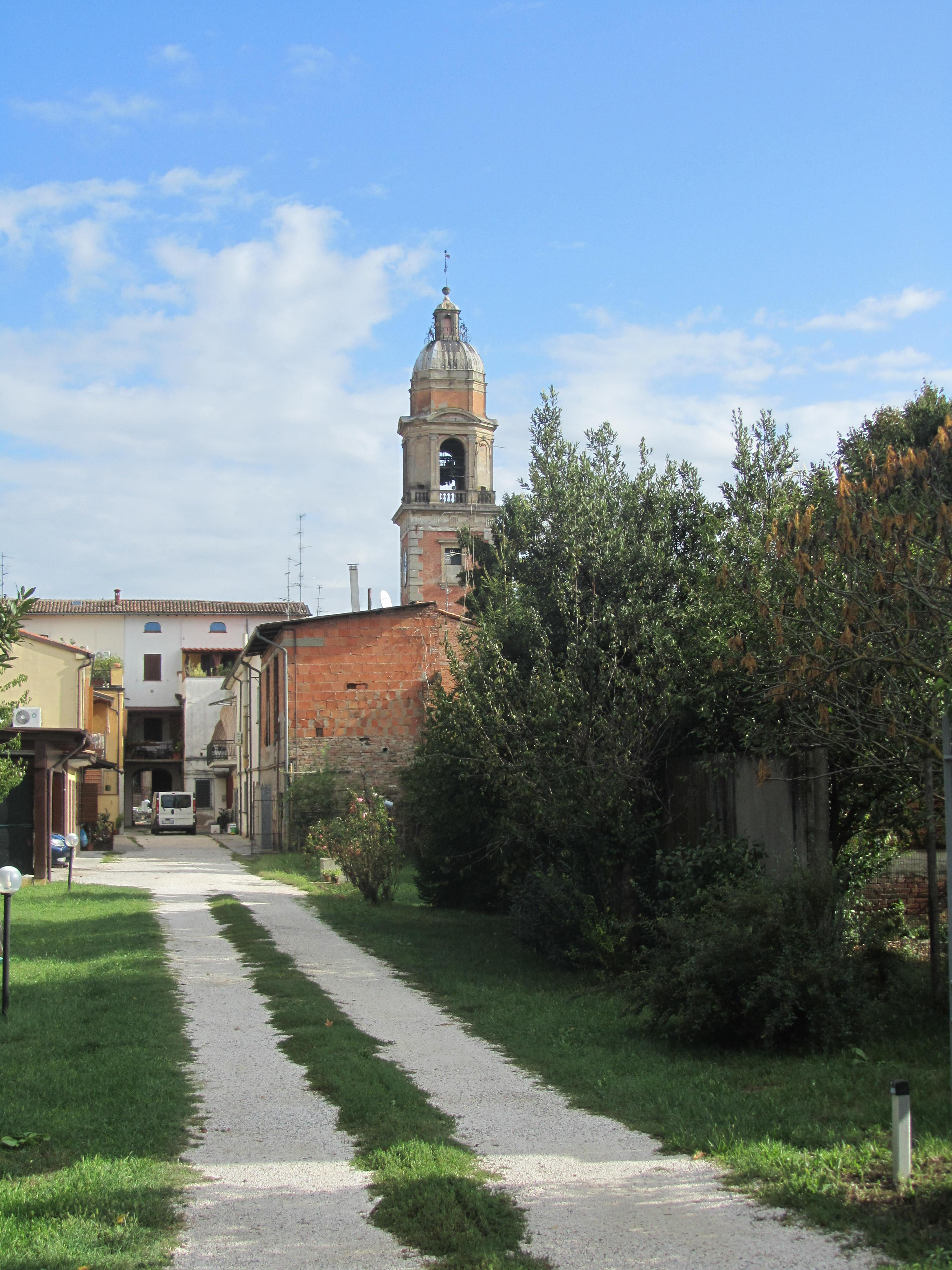 Scorcio di Rolo, provincia di Reggio Emilia.